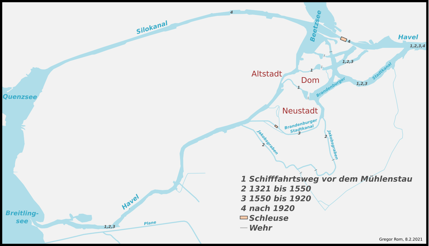 Schiffahrtswege durch die Stadt Brandenburg zu den verschiedenen Zeiten